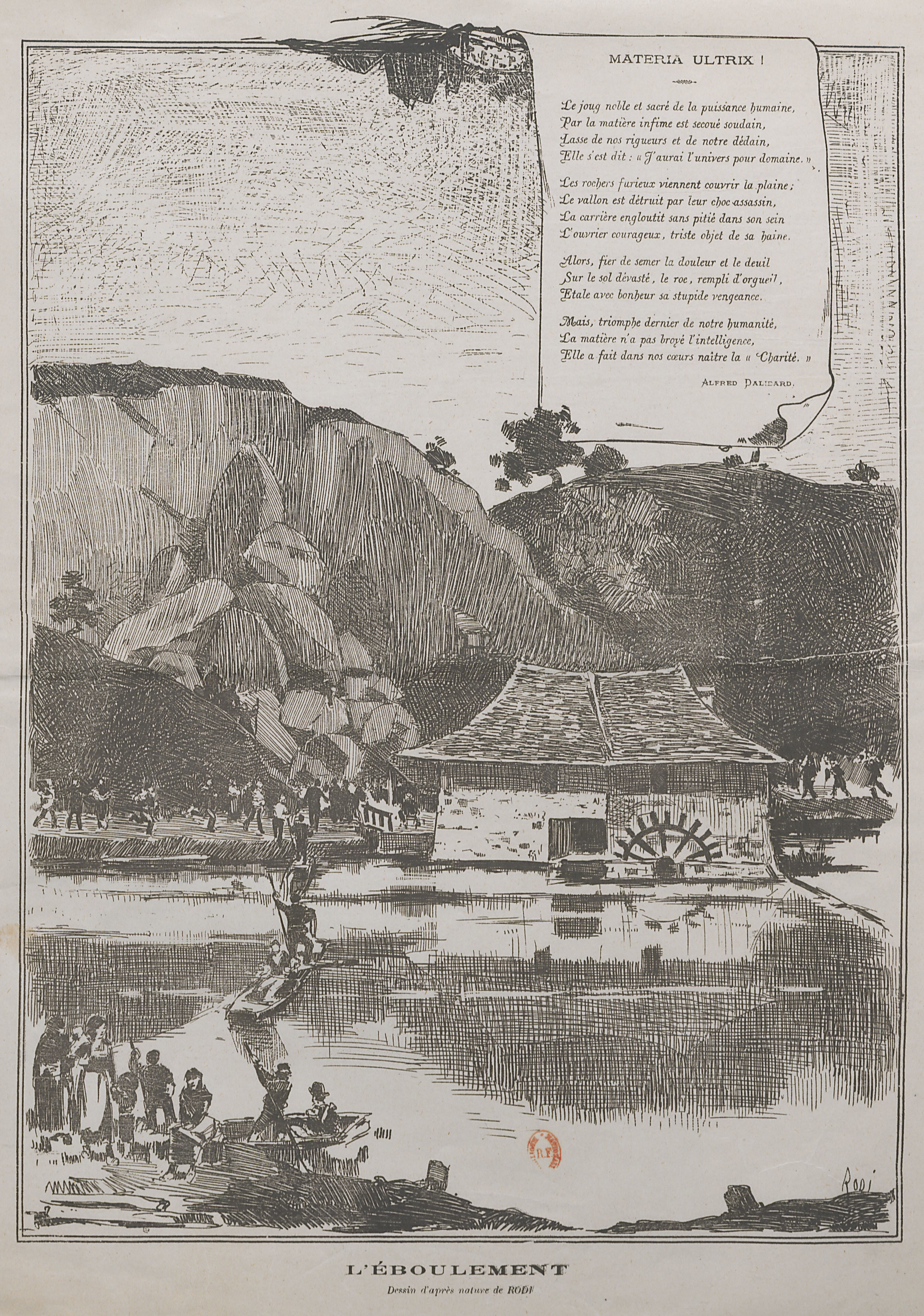 Dessin de RODI intitulé "L'éboulement", à la suite de la catastrophe du Boël en 1884.